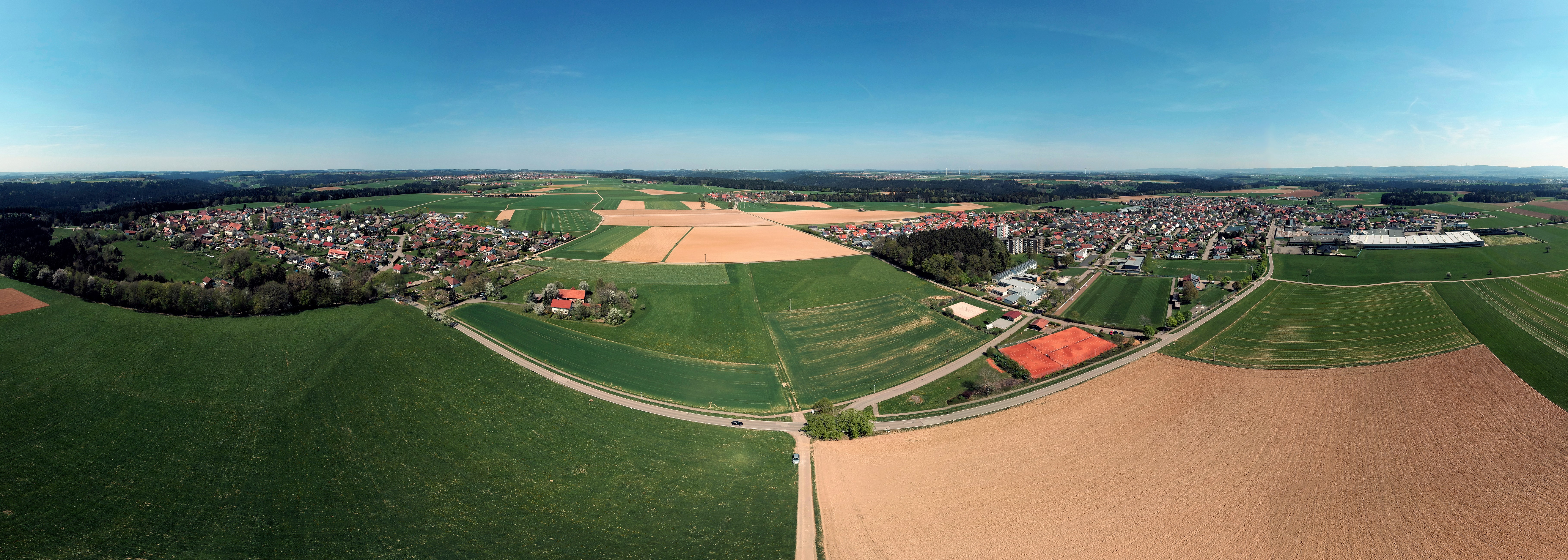 Vordergrund: Links Zimmerbach mit Karrenstrietle, rechts Durlangen. Dahinter Stutzenklinge und Tanau. Im Hintergrund: Spraitbach und Frickenhofer Höhe.